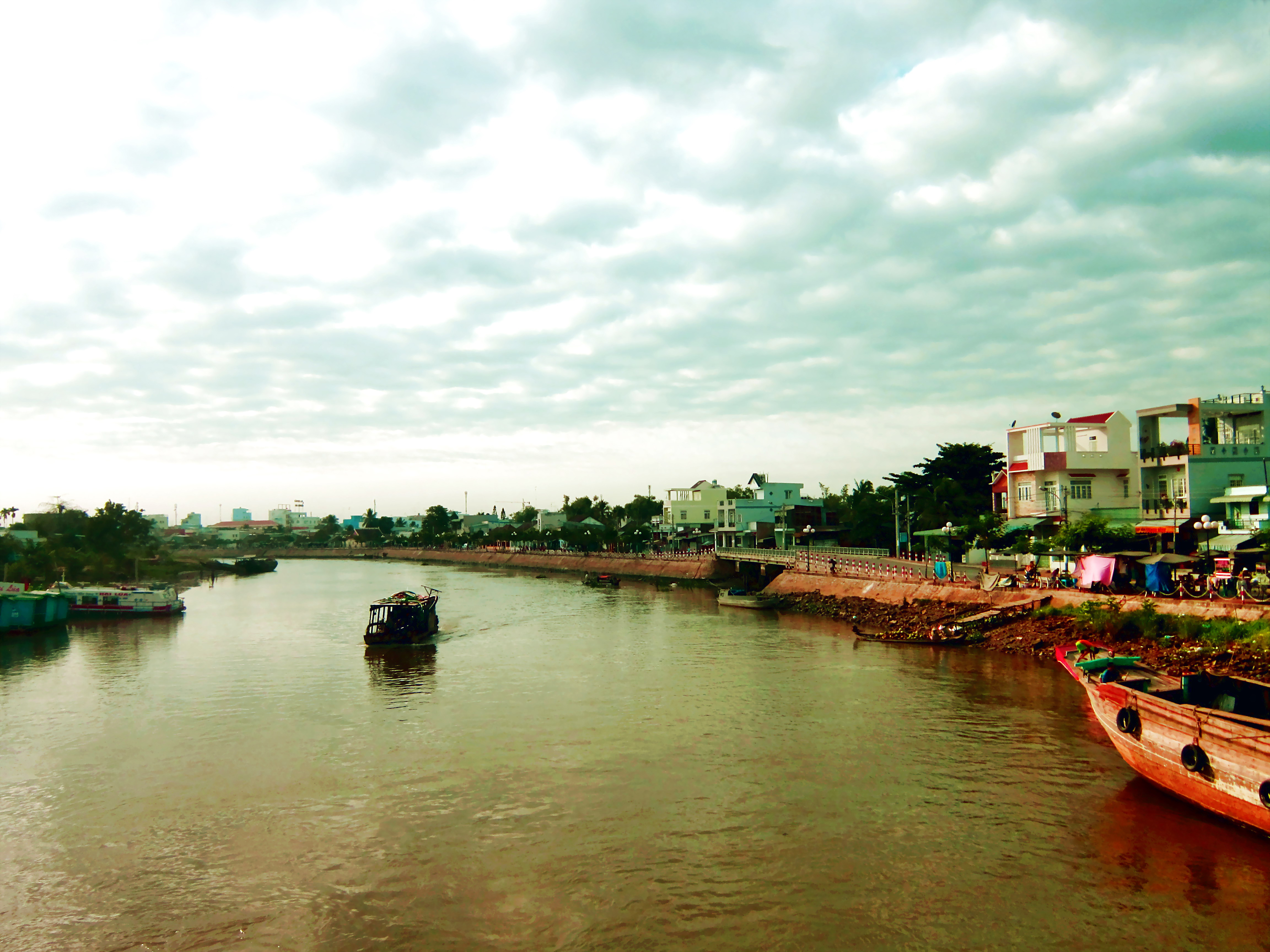 Một phần diện tích của phường Mỹ Xuyên (phải ảnh) nằm bên rạch Long Xuyên, thuộc thành phố Long Xuyên, tỉnh An Giang